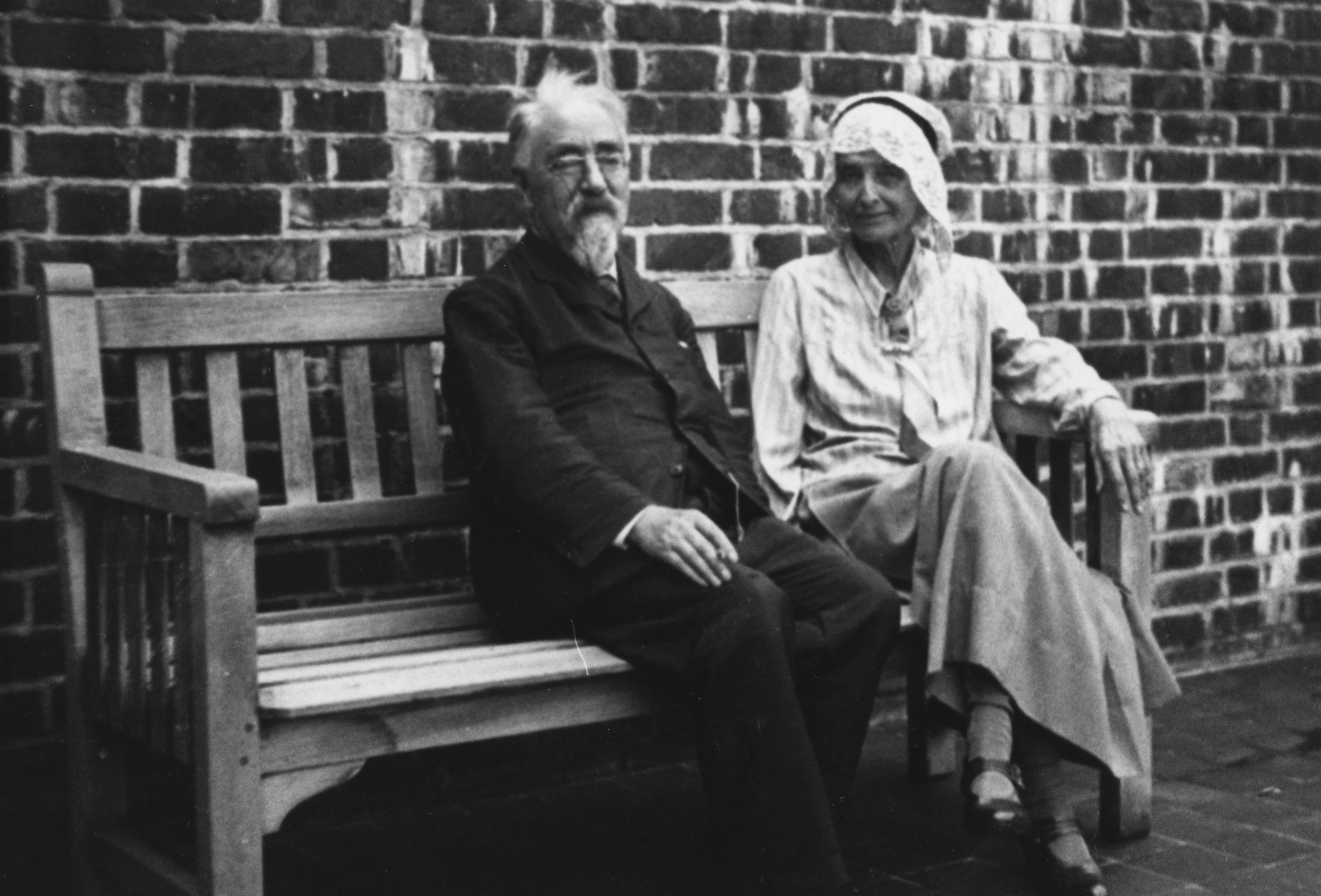 IMAGELIBRARY/70 Persistent URL